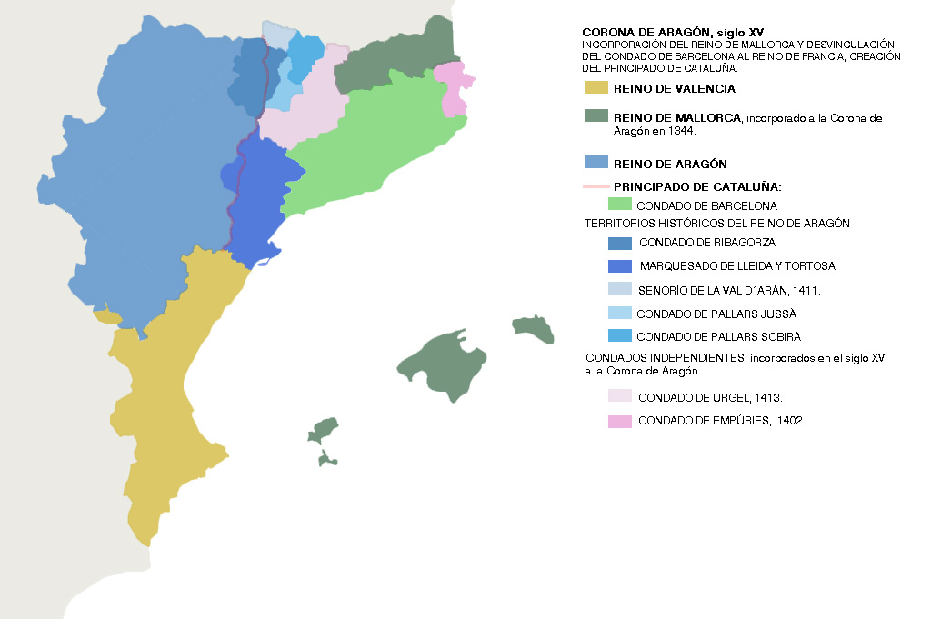 Muestra los diferentes territorios de la corona de Aragón en la península ibérica y baleares